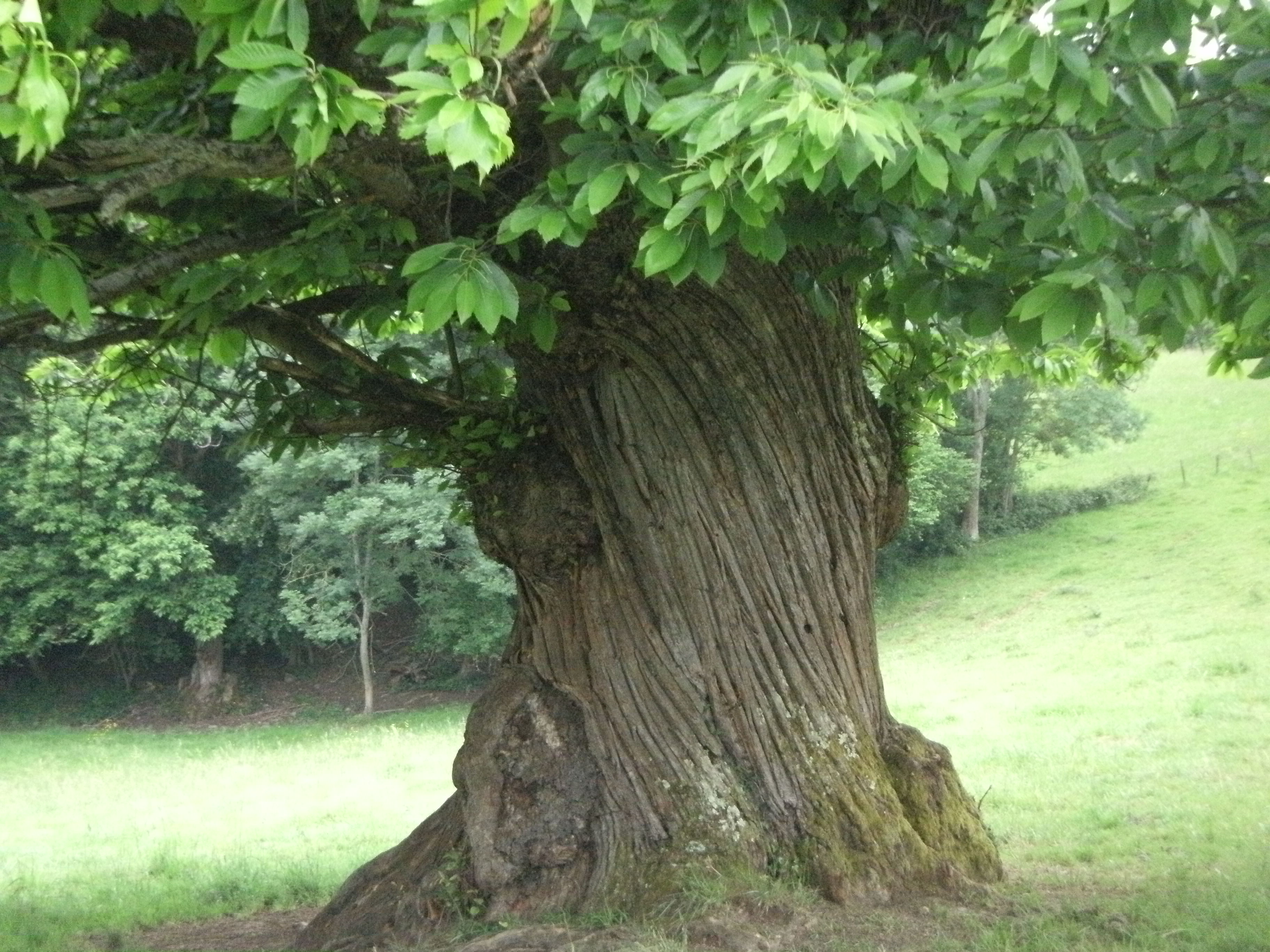 Saleich (Haute-Garonne, France) : Châtaignier (Castanea sativa) près d'un sentier de randonnée.